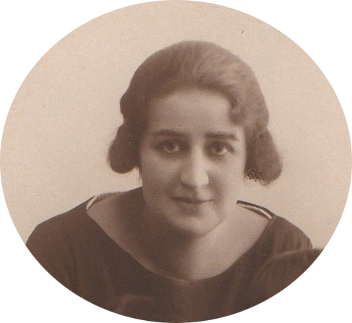 María Angélica Catán